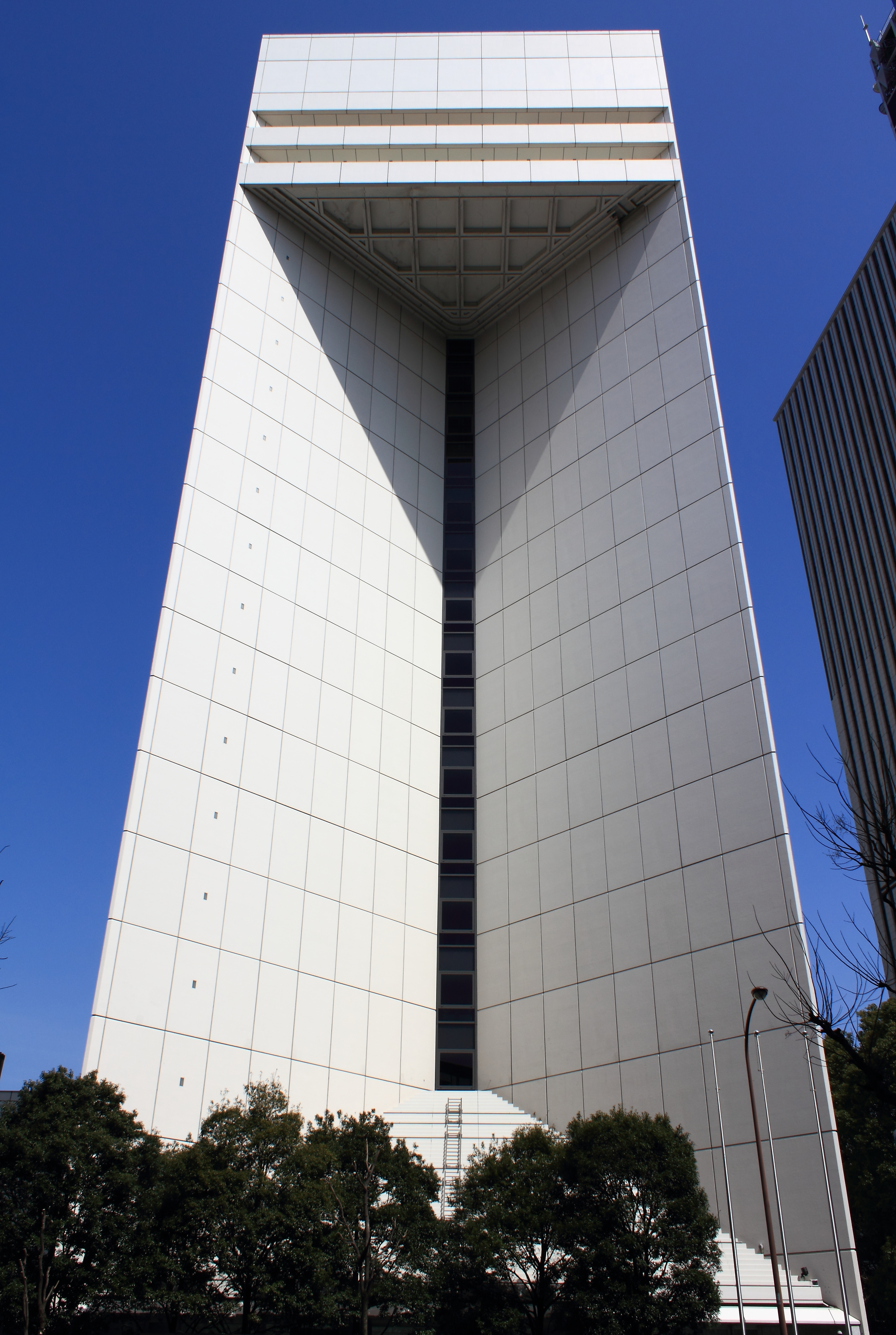 あおぞら銀行本店（東京都千代田区）